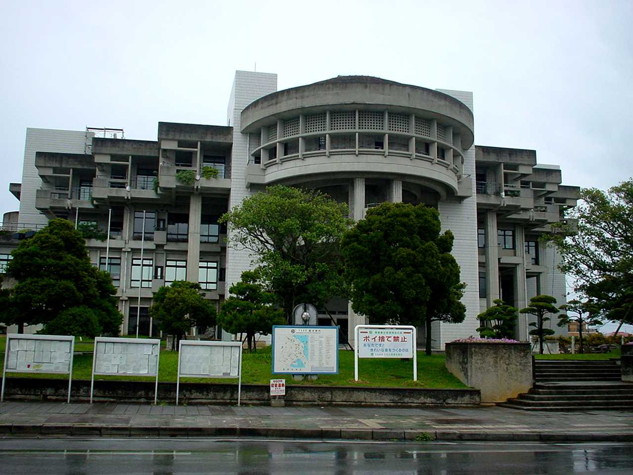 Uruma City Hall in Okinawa, Japan